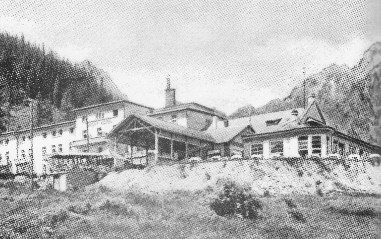 Stanica lanovky na Hrebienku - Vysoké tatry